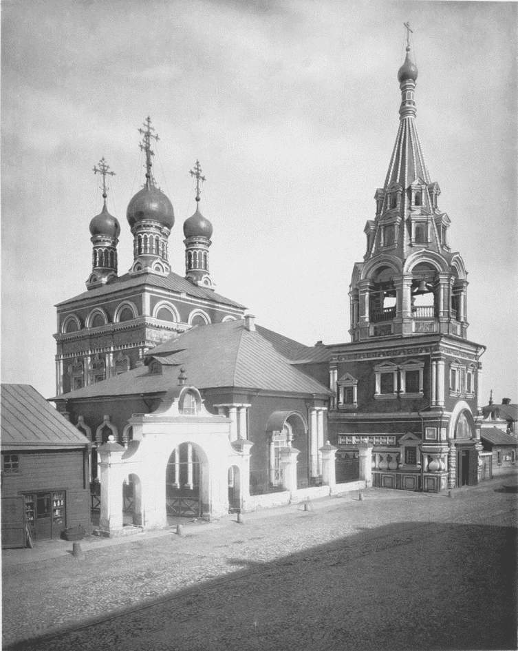 Храм Cвятителя Григория, епископа Неокесарийского в Дербицах (на Полянке)